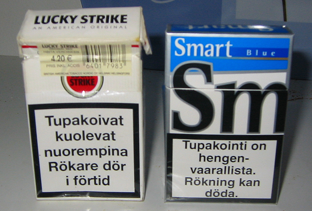 Finnish cigarette packs.